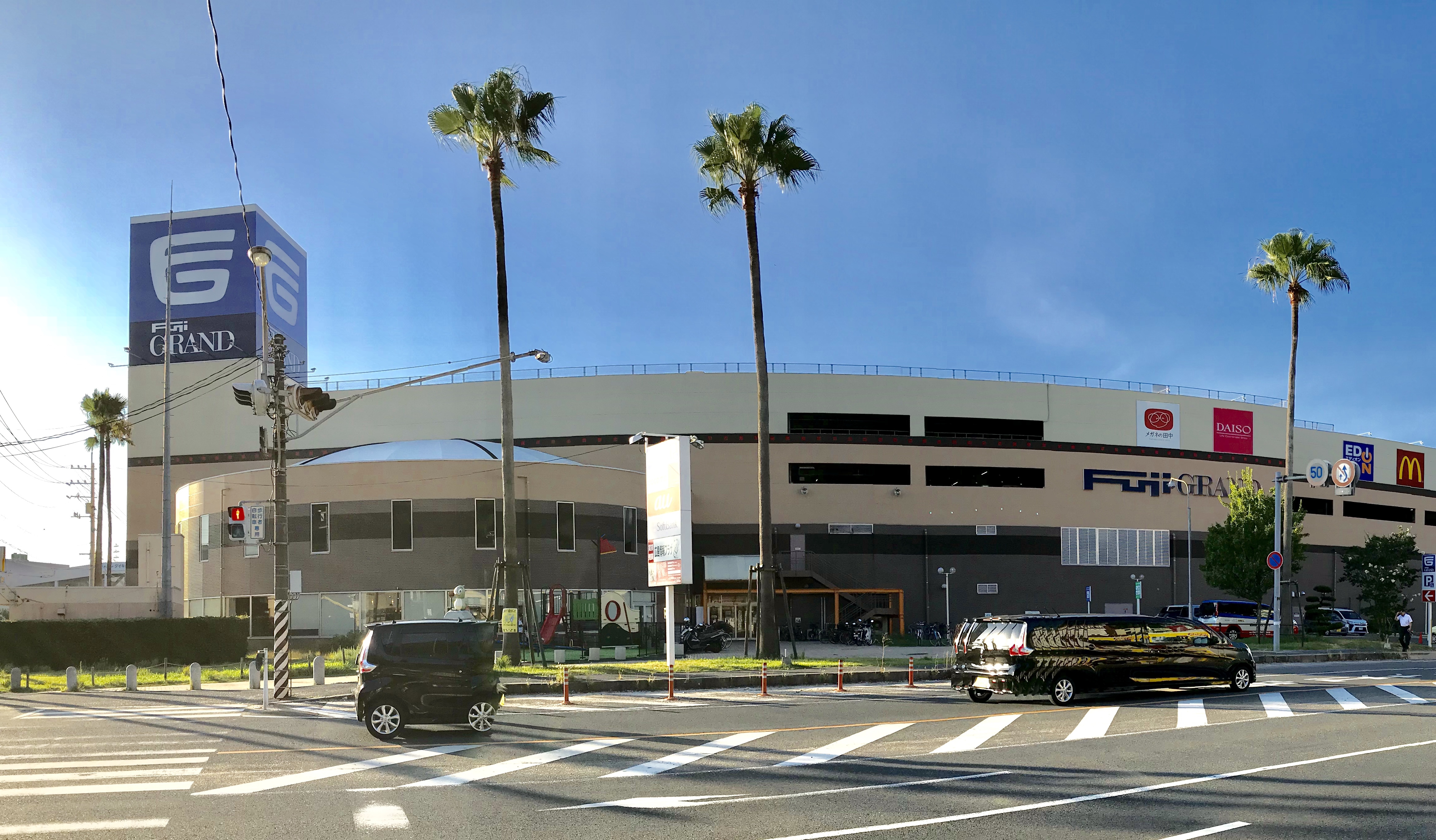 2018年8月のフジグラン安芸です。